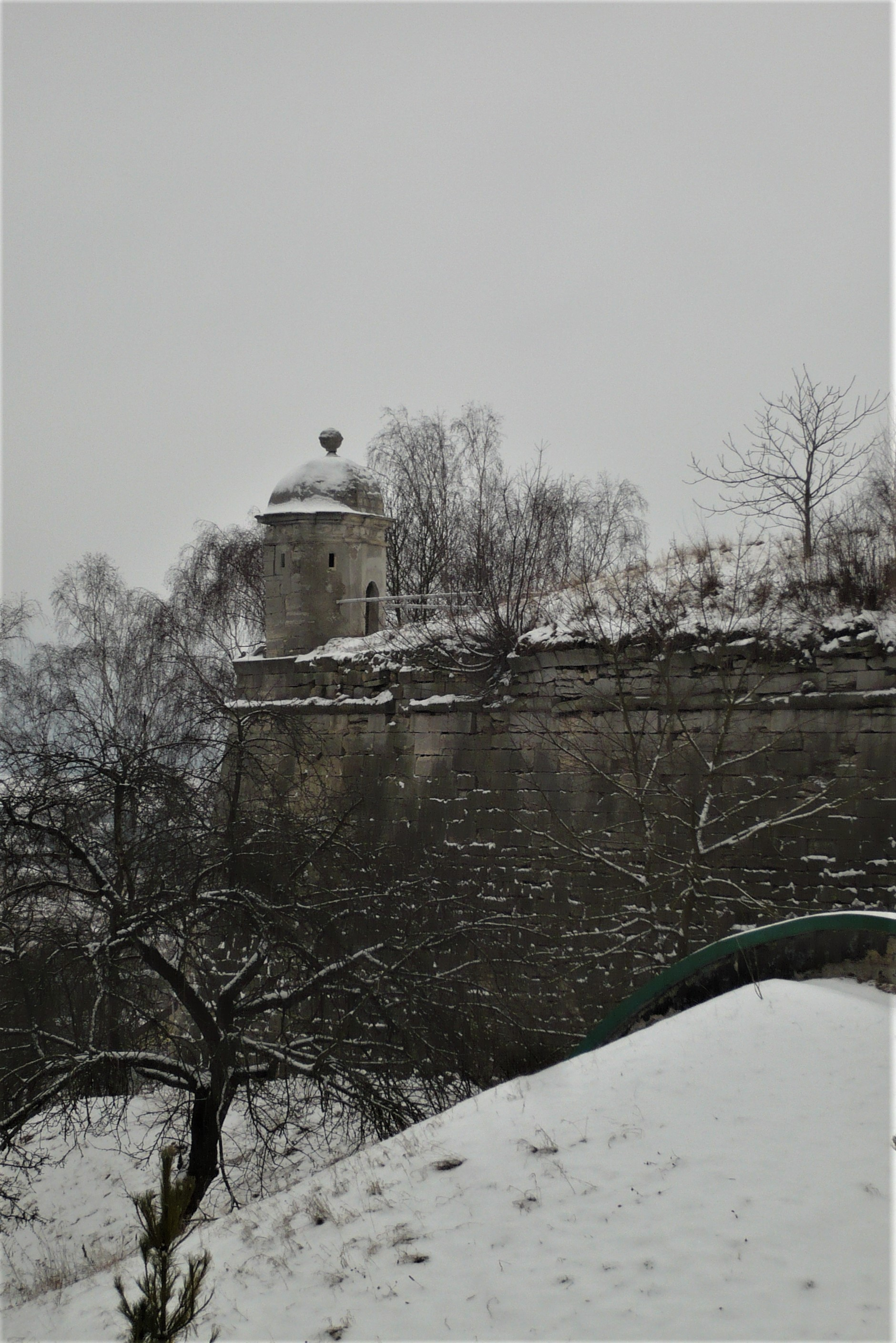 Zamek